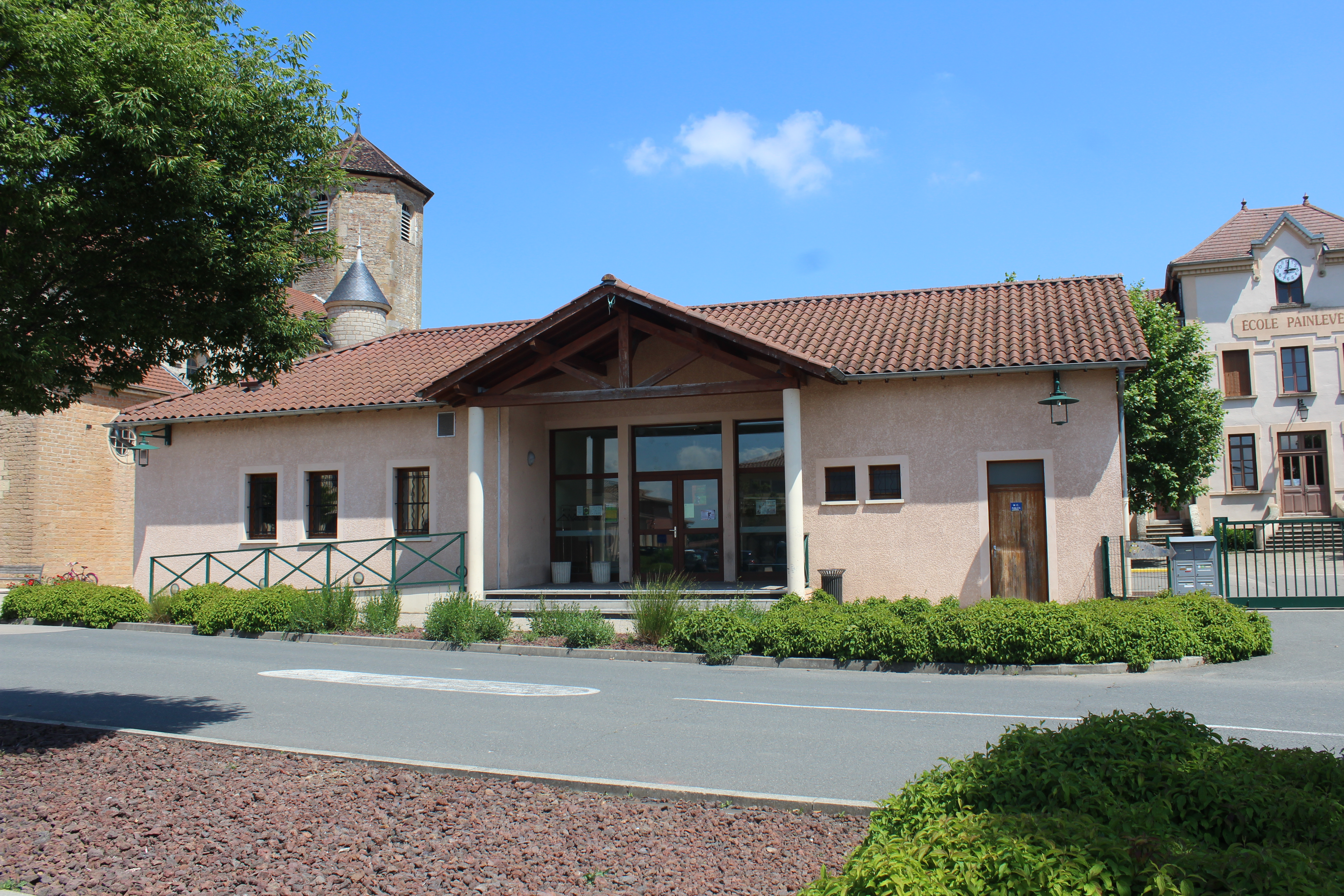 Salle des fêtes de Bâgé-la-Ville.